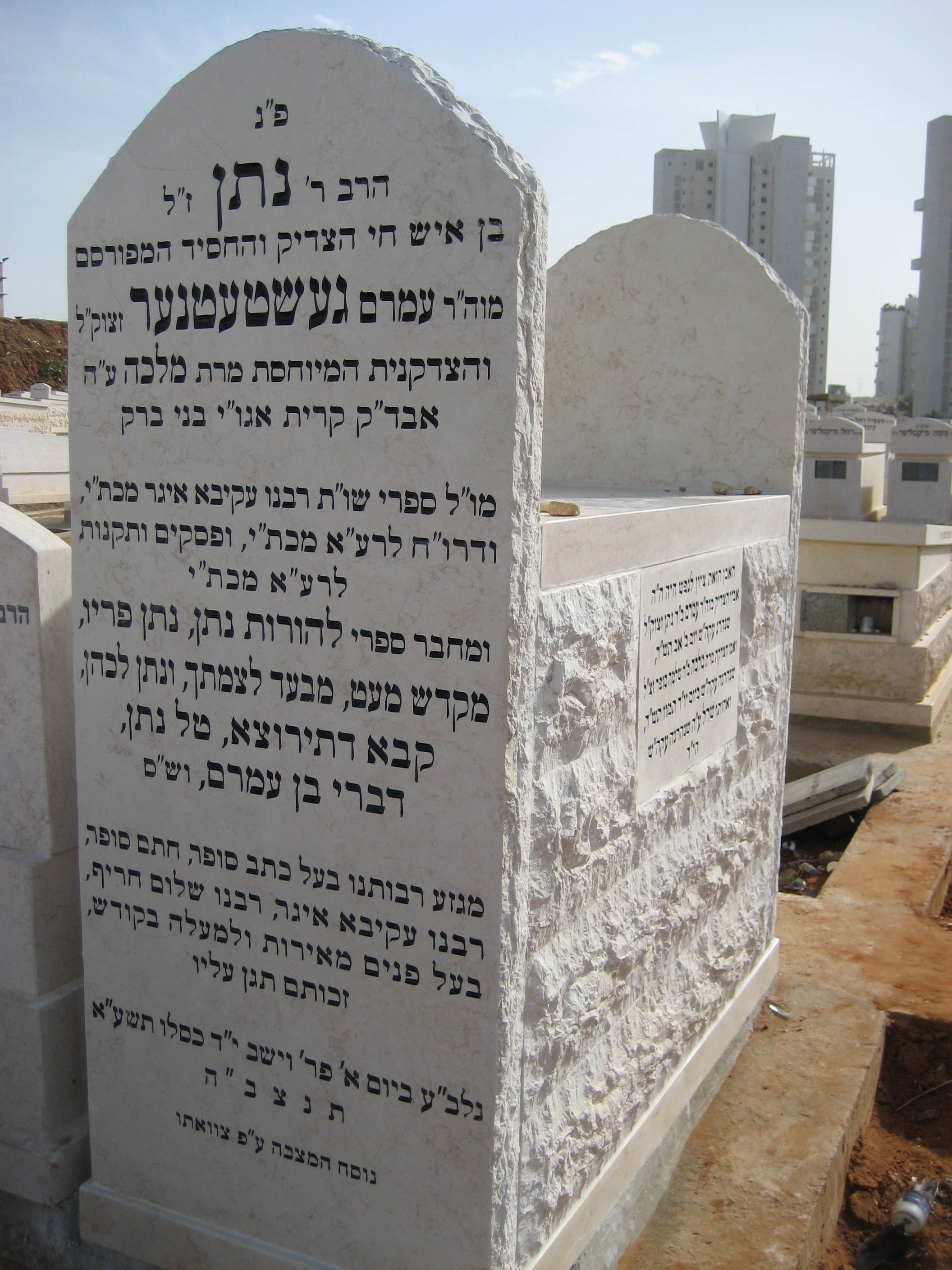 קברו של הרב הגאון רבי נתן גשטטנר זצ"ל אב"ד פנים מאירות